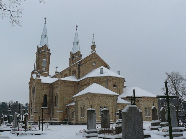 Костёл св. Михаила Архангела, Белогруда, Лидский район, Фото путешествия по Беларуси.